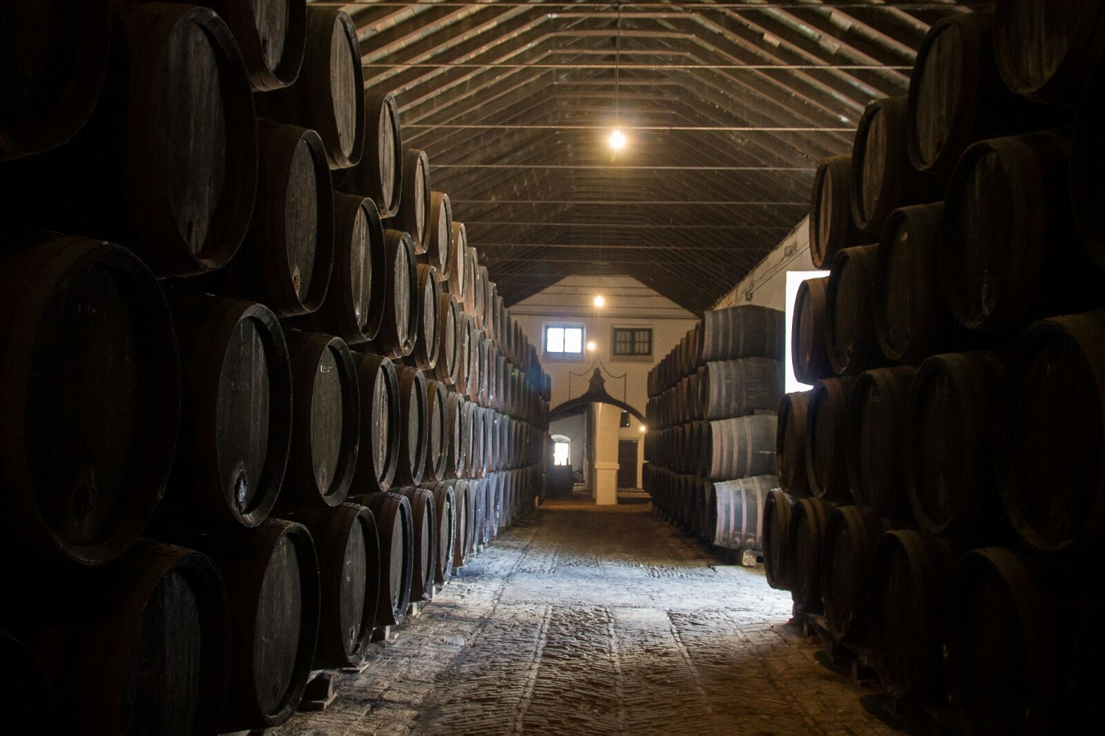 Antesala de la Viga de Husillo y Quintal de Bodegas Góngora de Villanueva del Ariscal (Sevilla). Se observa los cachones de botas a cuatro niveles que indican que el sistema de producción es el de criaderas y soleras.